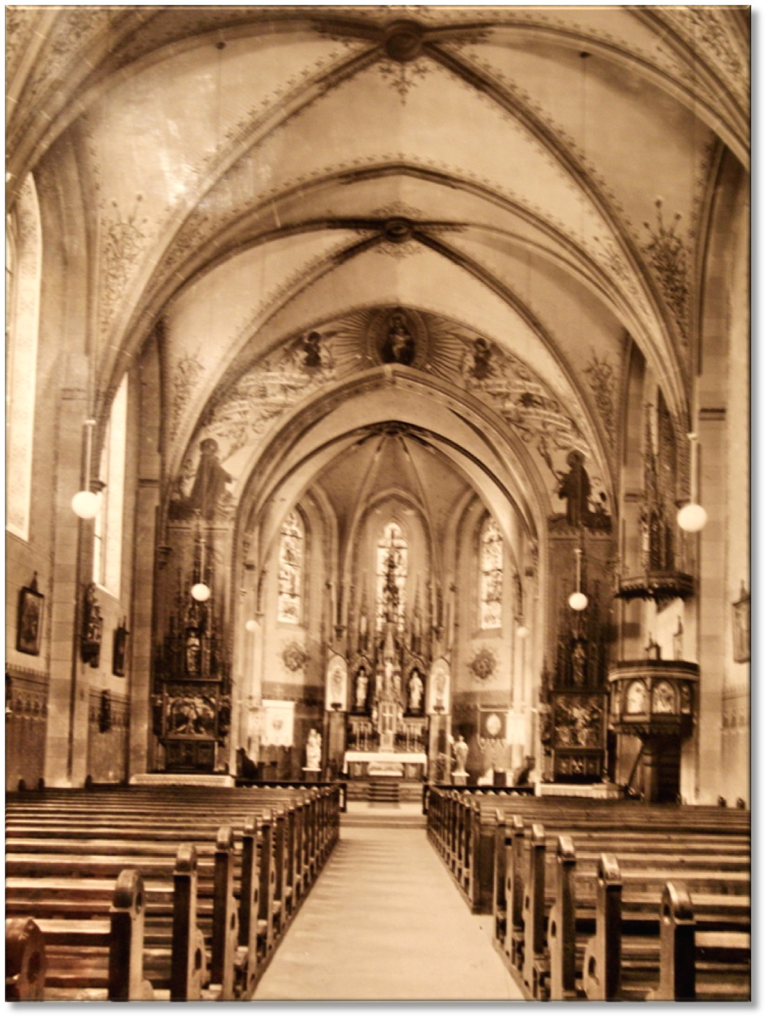 Innenansicht der St. Nikolauskirche in Veringenstadt um 1930. Auf der linken Seite des Chorbogens befand sich das Bild von Hermann dem Lahmen, aus dem Geschlecht der Grafen von Veringen. Er war genialer Mönch von der Reichenau und wurde von seinen Zeitgenossen "Wunder des Jahrhunderts" genannt. In der alten Pfarrkirche (vor 1862) stand ein eigener Seitenaltar zu Ehren des sel. Hermann des Lahmen. Dieses Bild Hermann`s hängt heute in Deutstetten. Auf der rechten Seite des Chorbogens war der hl. Fidelis von Sigmaringen dargestellt.